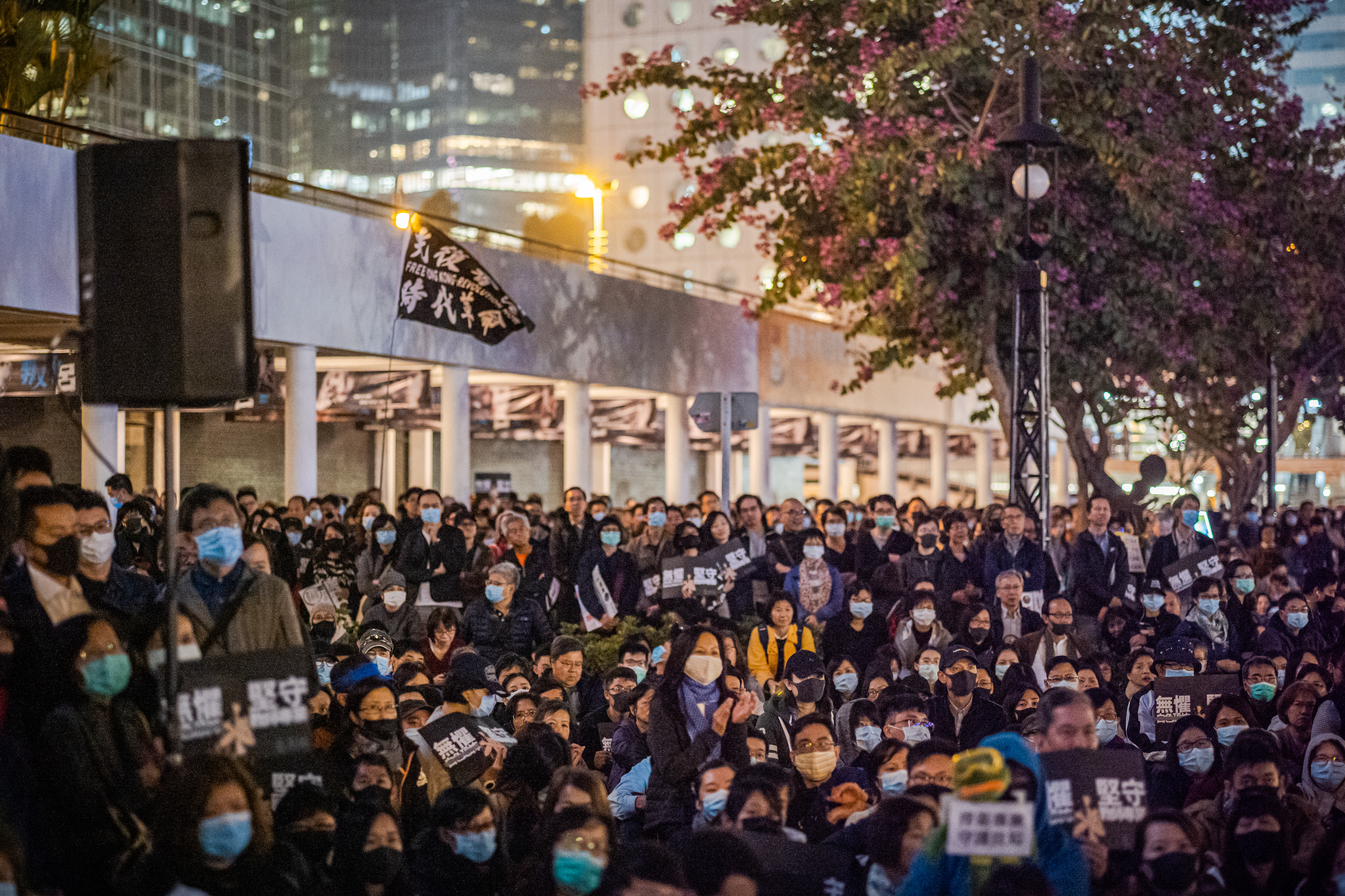 SDIM1407